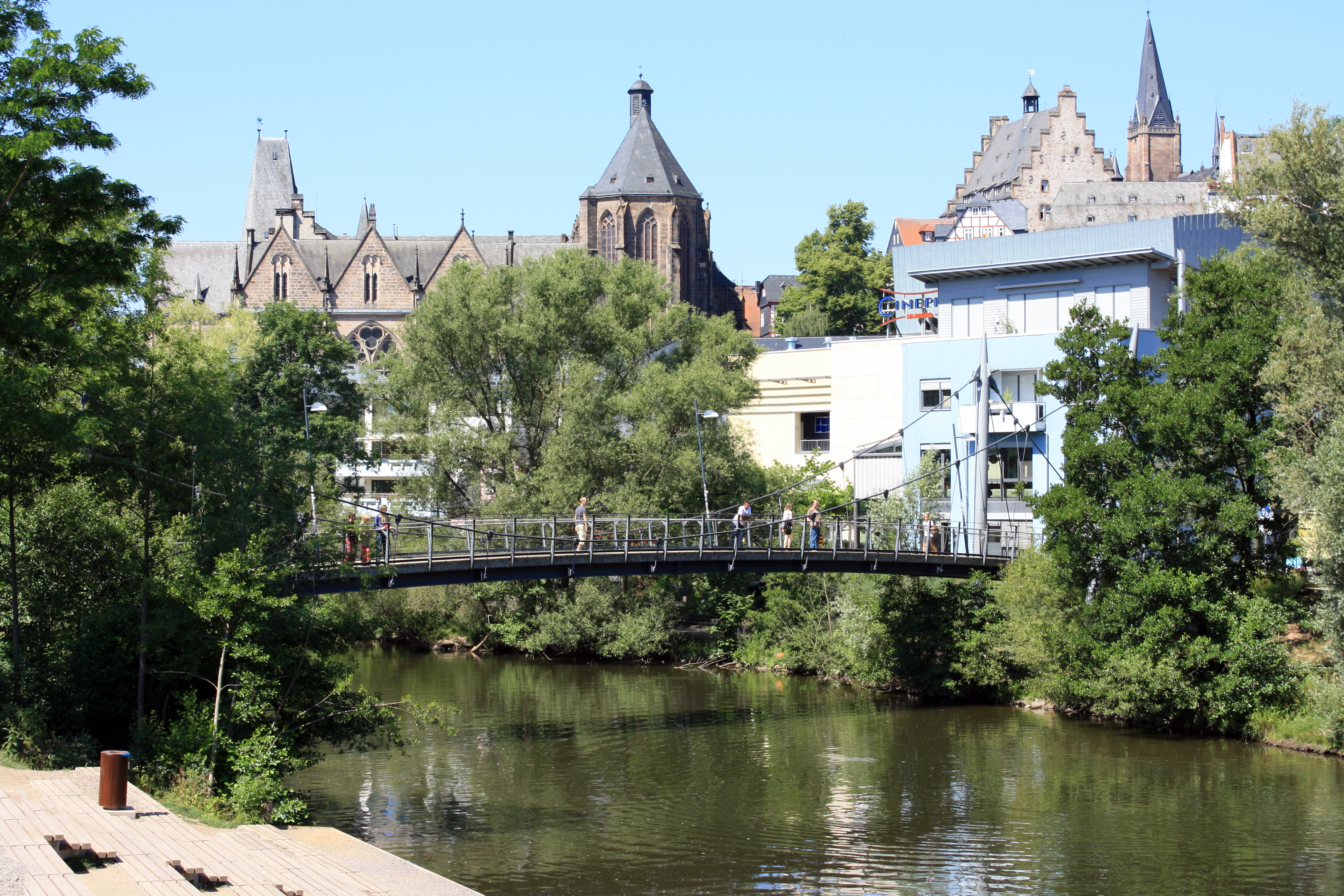 Die Mensa-Brücke in Marburg